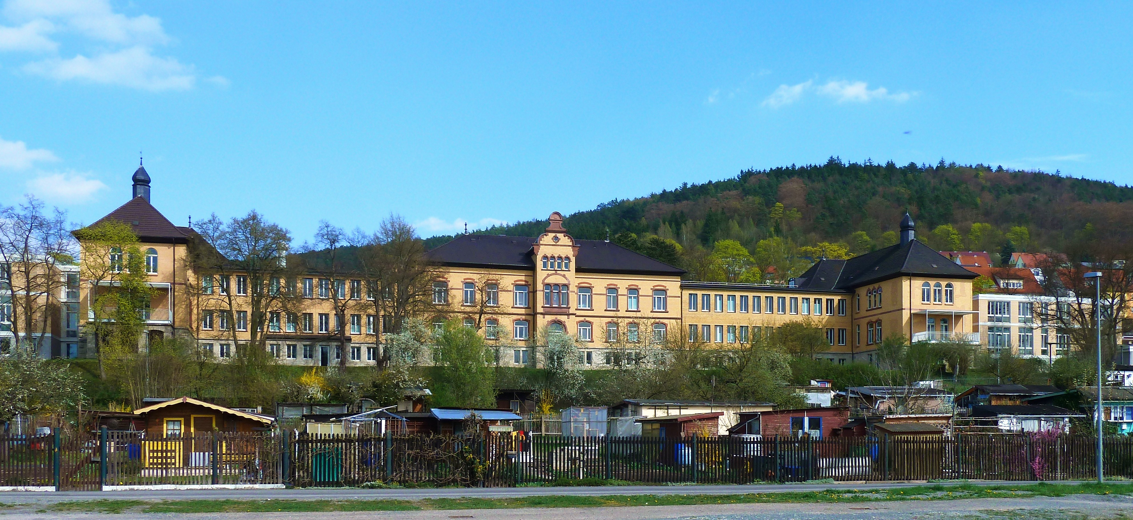 Geriatrische Fachklinik Meiningen, ehemals Georgenkrankenhaus.